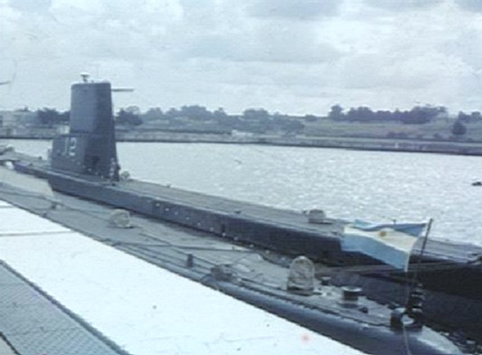 Submarine ARA Santiago del Estero at anchor in Mar del Plata's naval base (circa 1969).